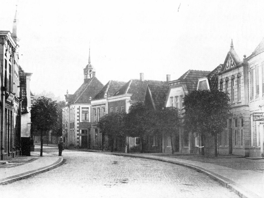 Nordhorn